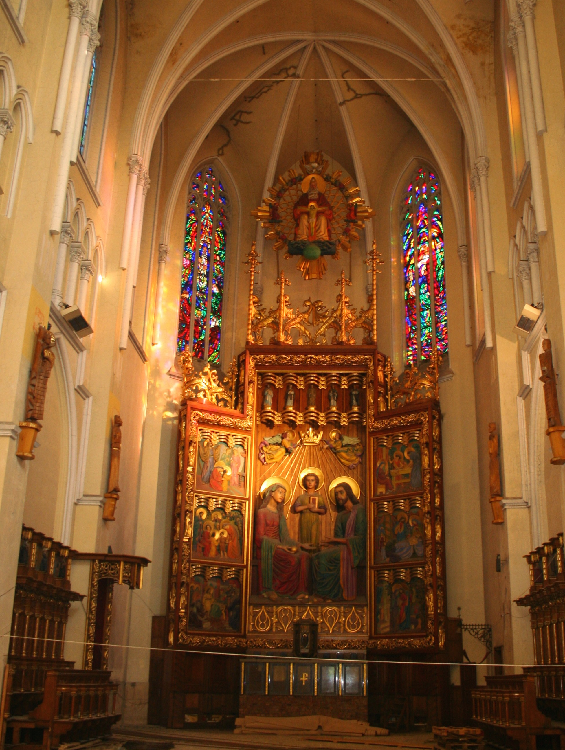 Archikatedra św. Rodziny w Częstochowie - ołtarz